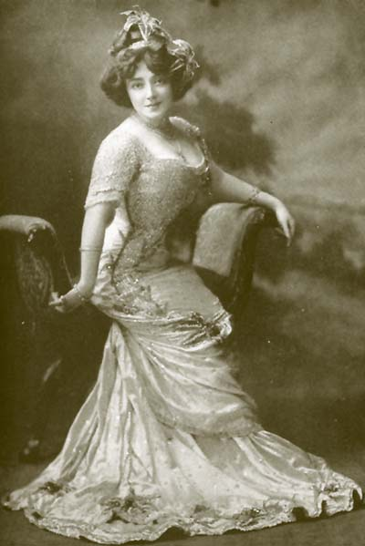 Portrait photographique de Anna Held